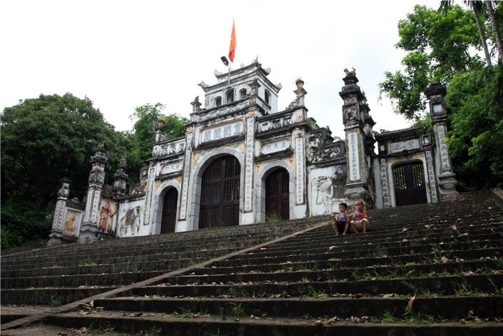 Tam quan đền Sái ở huyện Đông Anh, Hà Nội.